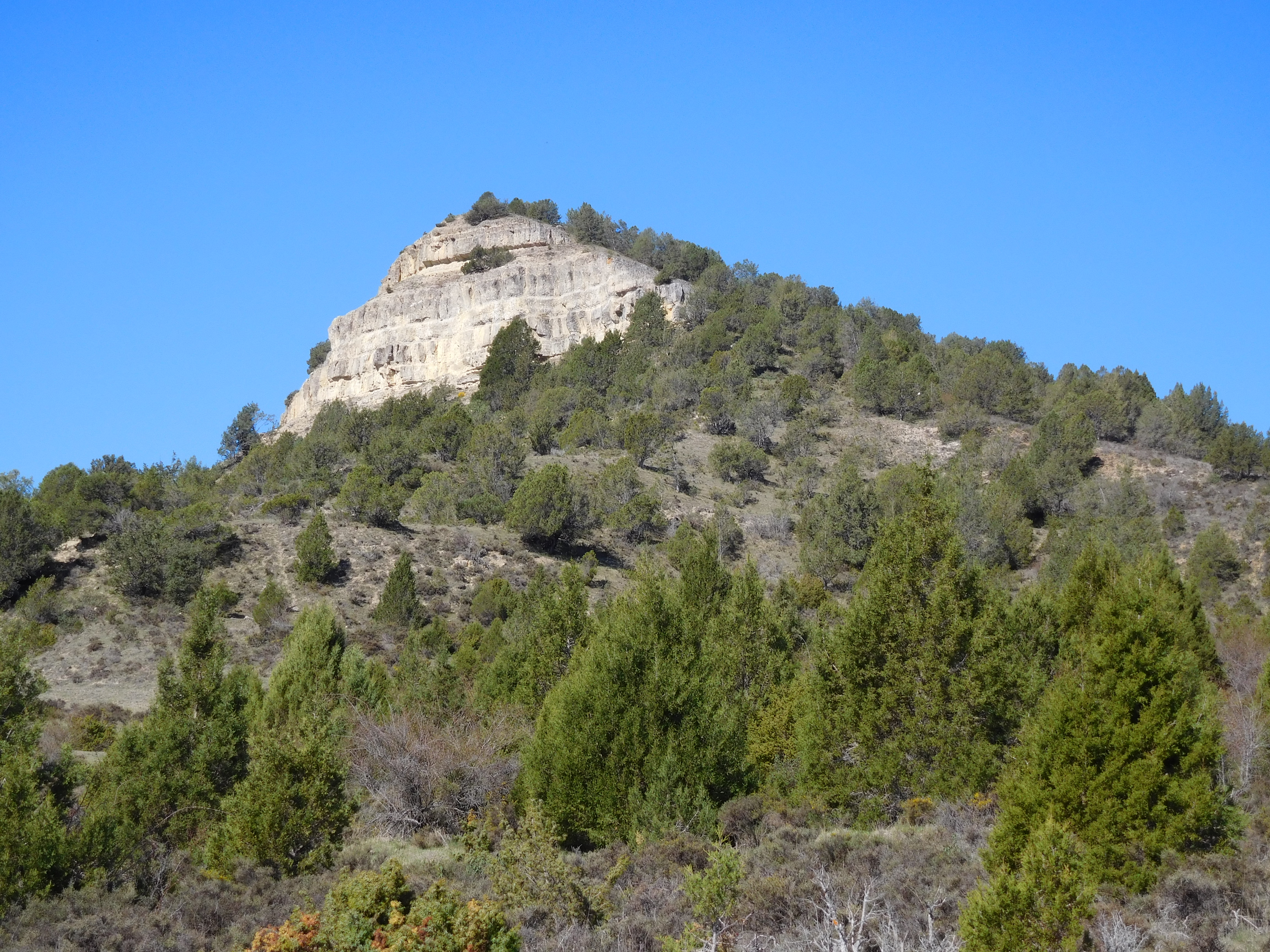 La cuesta " El Pico "